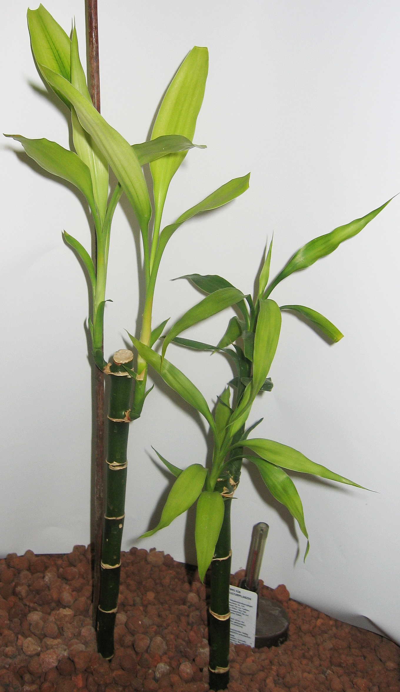 Dracaena sanderiana "Glücksbambus", zwei Pflanzen in Hydrokultur gewachsen, Genehmigung: siehe unten